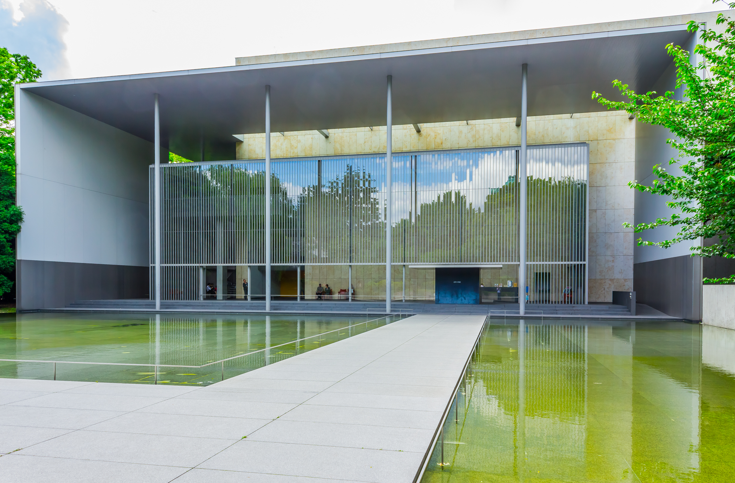 法隆寺宝物館 - 東京国立博物館（設計：谷口吉生）